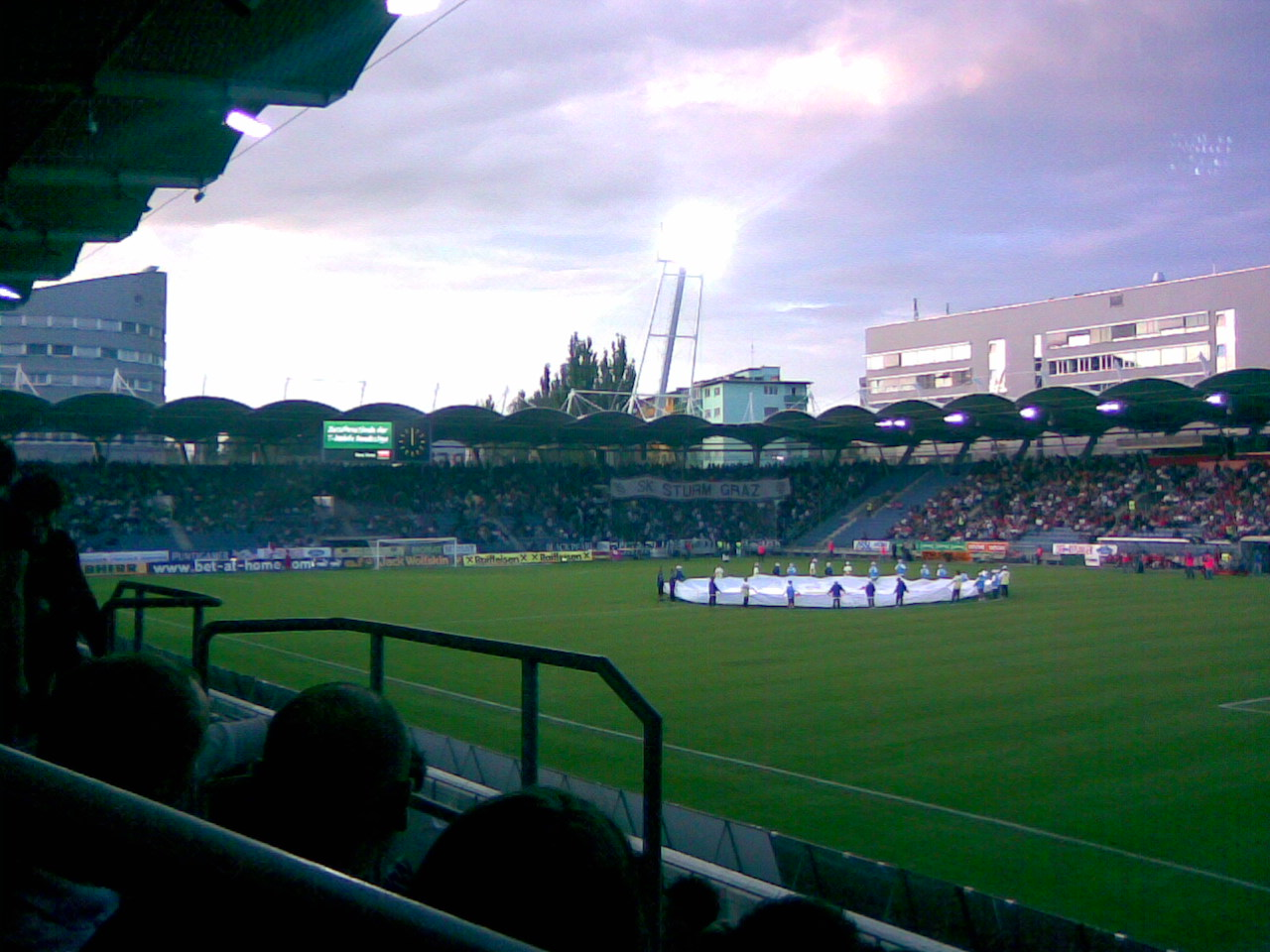 127. Grazer Stadtderby